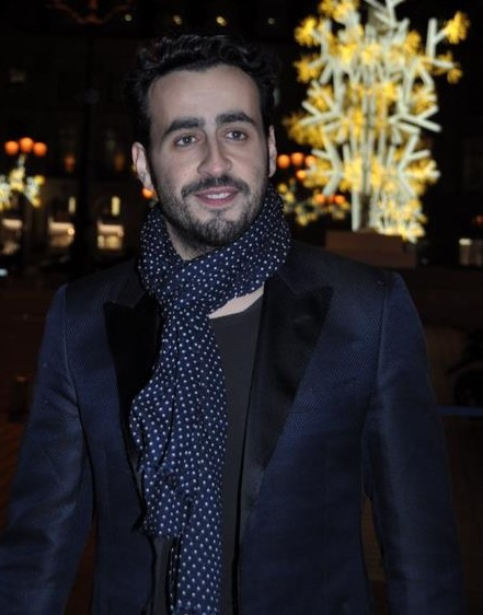 Jonathan Cohen au dîner des révélations des César